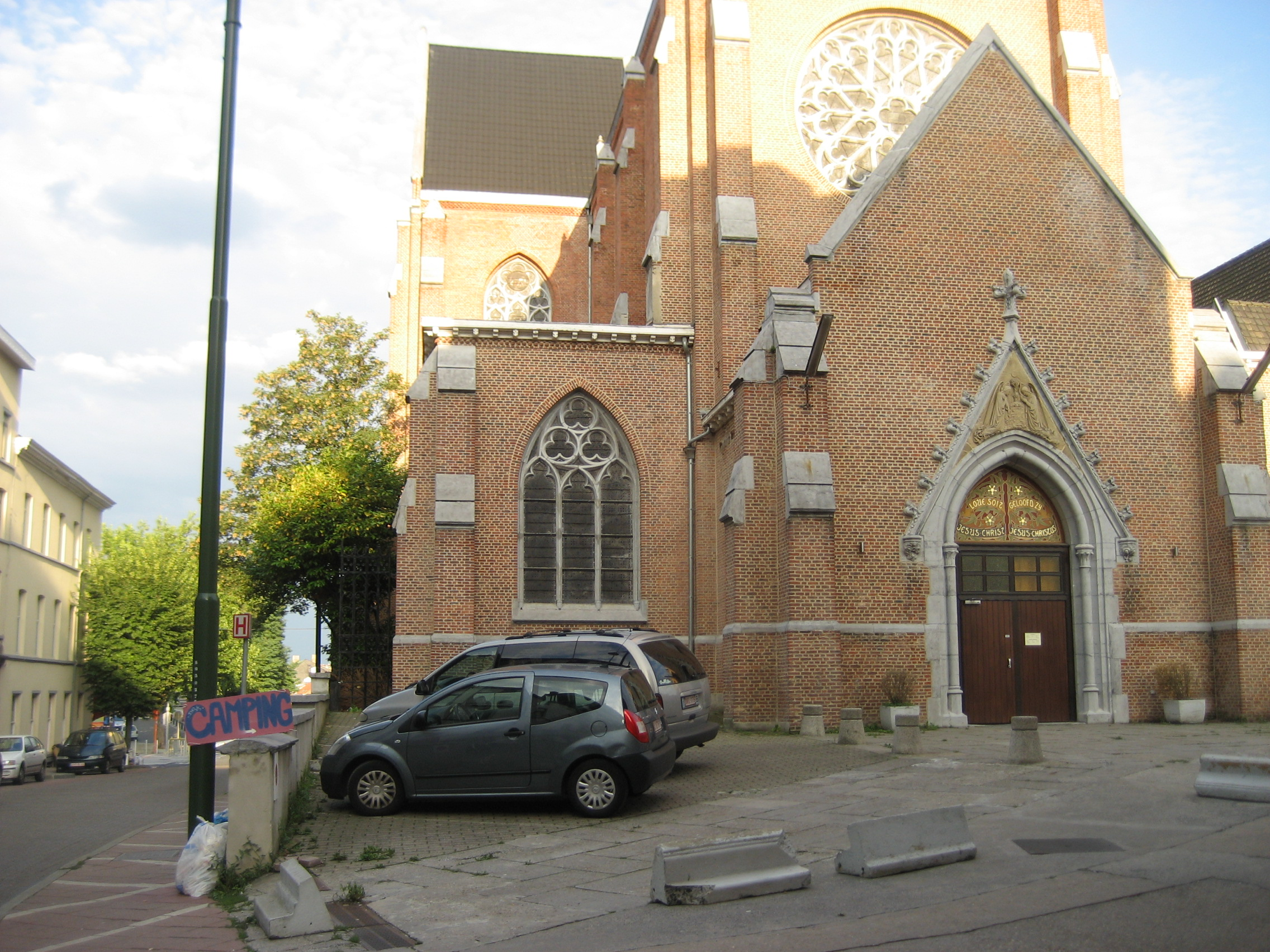 Brussel, Waverse steenweg 205 - Eglise des Peres du Tres Saint-Sacrement, Bruxelles, Chaussée de Wavre 205 Ixelles